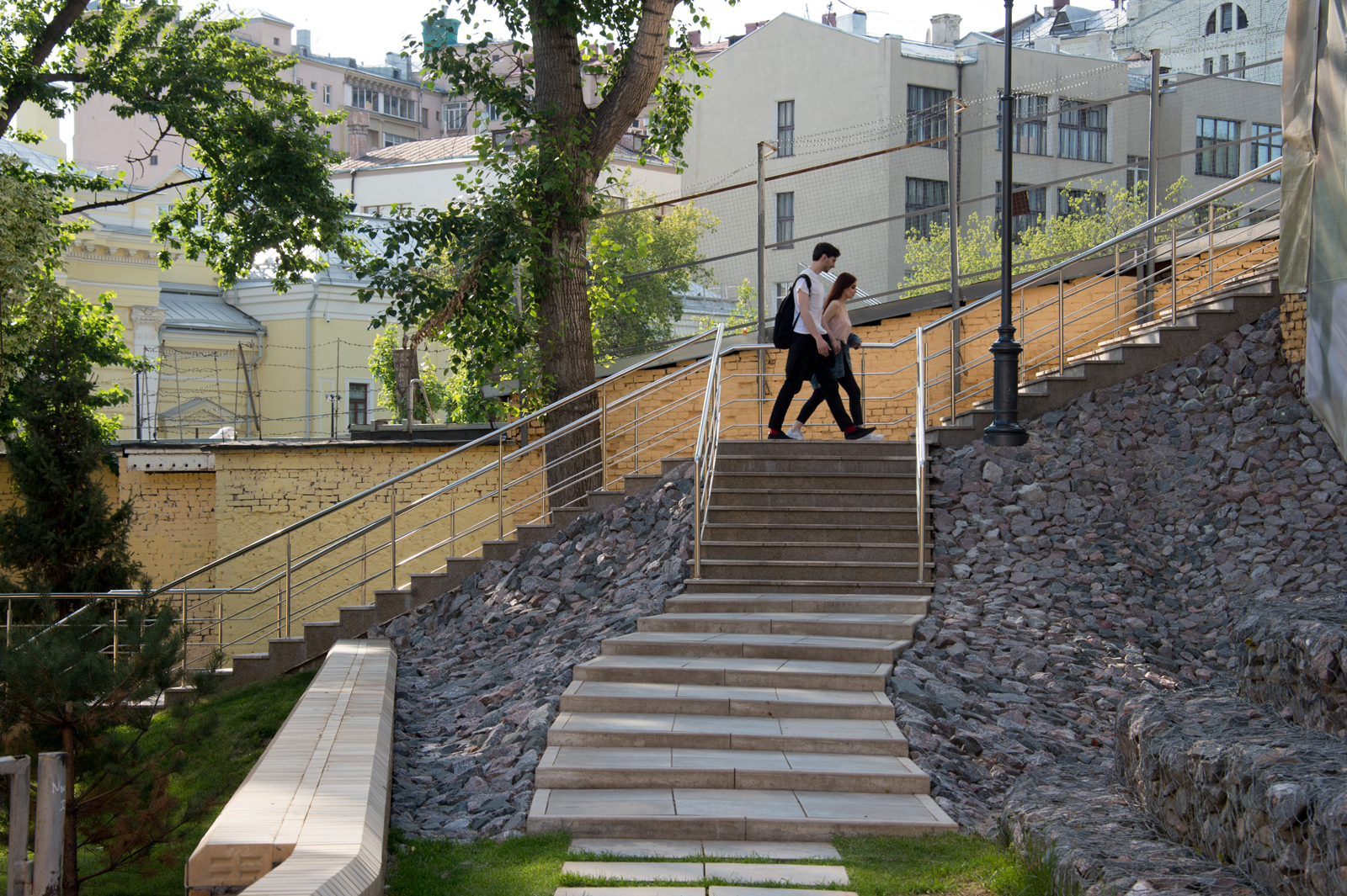 Парк Горка. Главная лестница